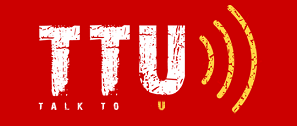 Logo de Radio TTU depuis l'année 2010.